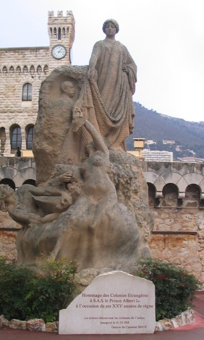 Mälestusammas vürst Albert I-le, taustal Monaco vürstiloss